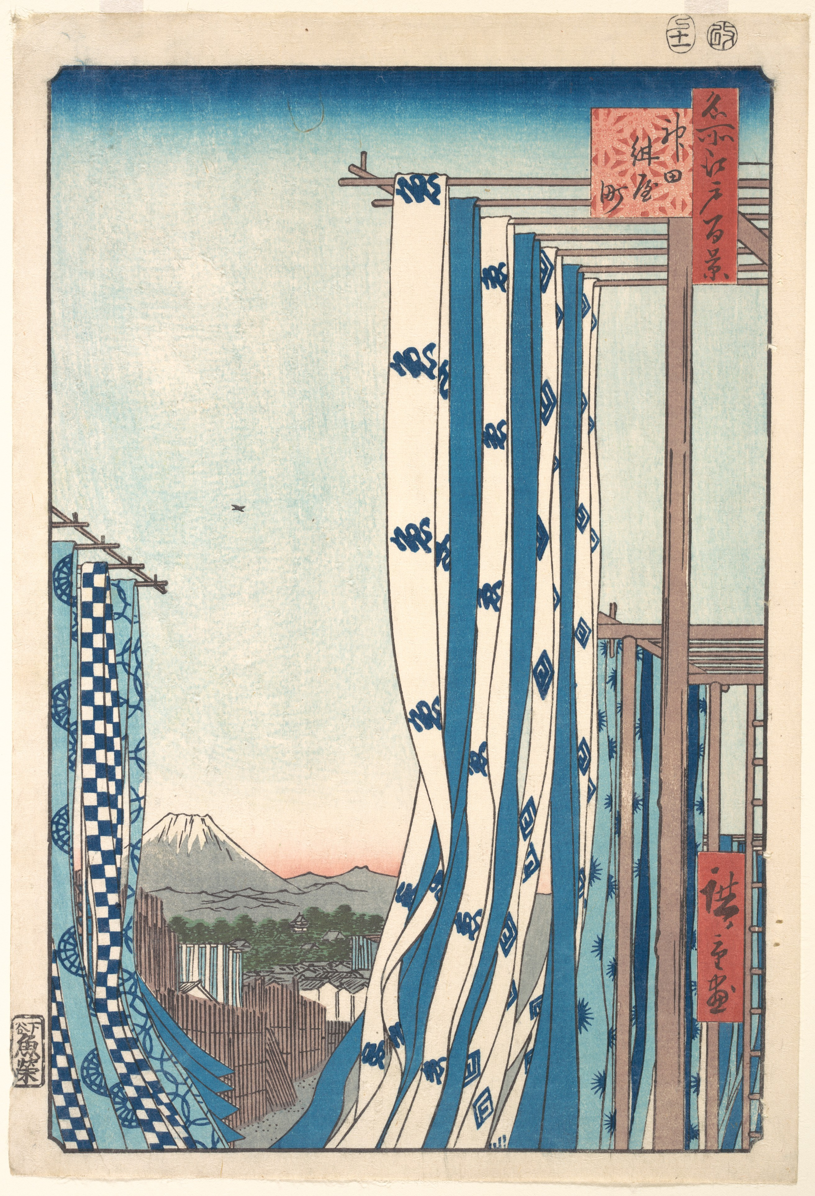 Japan; Print; Prints